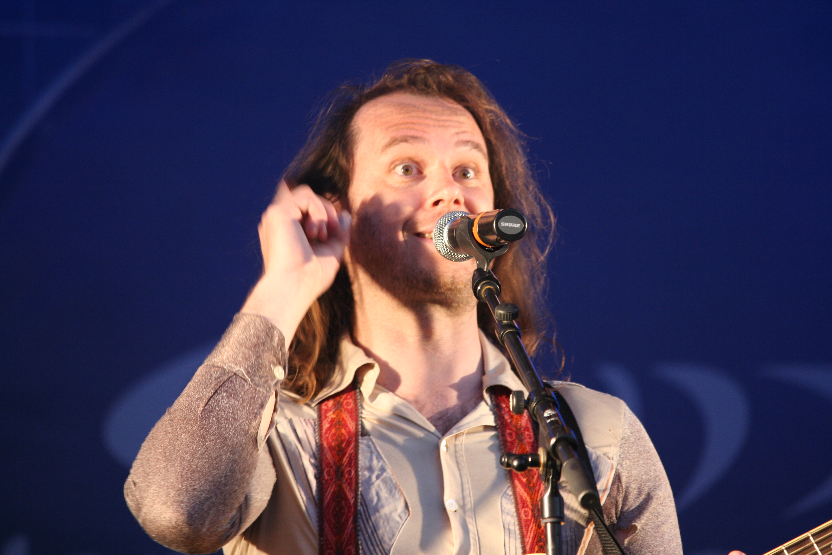 Fête de la Musique à Saint-Lô - France : La Chanson du Dimanche